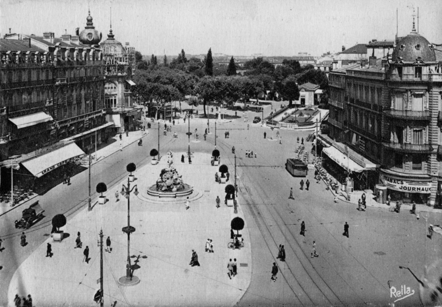 Chemins de fer de l'Hérault - Scan d'une carte postale ancienne de la Place de la Comédie de Montpellier. La gare de l'Esplanade et le "Petit jardin de la gare de Palavas" sont visibles au fond à droite, au dessus de l'autocar garé devant le Café des Trois-Grâces. Nous sommes en 1949 juste après la suppression des Tramways électriques de Montpellier dont les voies et lignes aériennes sont toujours en place.